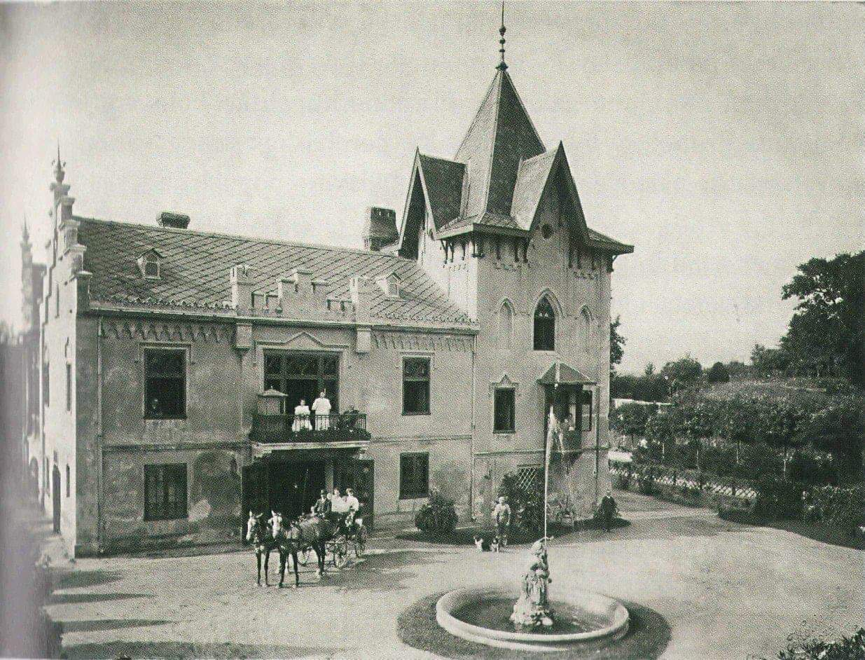 Die Villa aus der zweiten Hälfte es 19. Jahrhunderts wurde in den 1980 Jahren abgerissen.